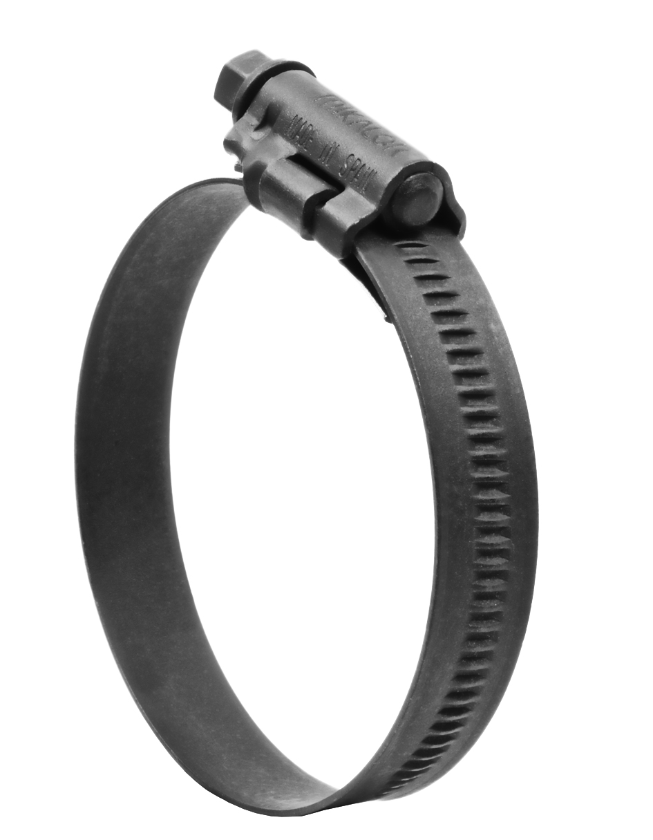 Al utilizar como materia prima para su fabricación el Titanio, juntamente con el innovador diseño de su cabezal y el ancho de su banda, permite obtener los mejores resultados comparativos en peso, rendimiento y corrosión, respecto a cualquier otra abrazadera del mundo. Gracias a la utilización de sistemas revolucionarios en su fabricación, podemos suministrar toda la gama, desde el diámetro más pequeño (16-27) hasta el diámetro mayor (220-240). Dadas sus altas prestaciones, (menor peso, mayor resistencia a la presión y mayor resistencia a la corrosión), está especialmente indicada para aplicaciones en motores de alta competición, motores marítimos, aeronáuticos, además de la industria química.Cada una de las abrazaderas son verificadas unitariamente mediante sistemas automáticos de control, para asegurar así su correcto funcionamiento. Cumple holgadamente con todas las normativas y directrices europeas. La presión máxima de aplicación dependerá del tipo de manguera y de la geometría del racord. Patentado mundialmente.